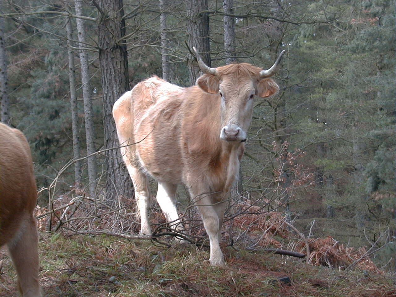 Betizu bat Elgeako mendizerran. Araba